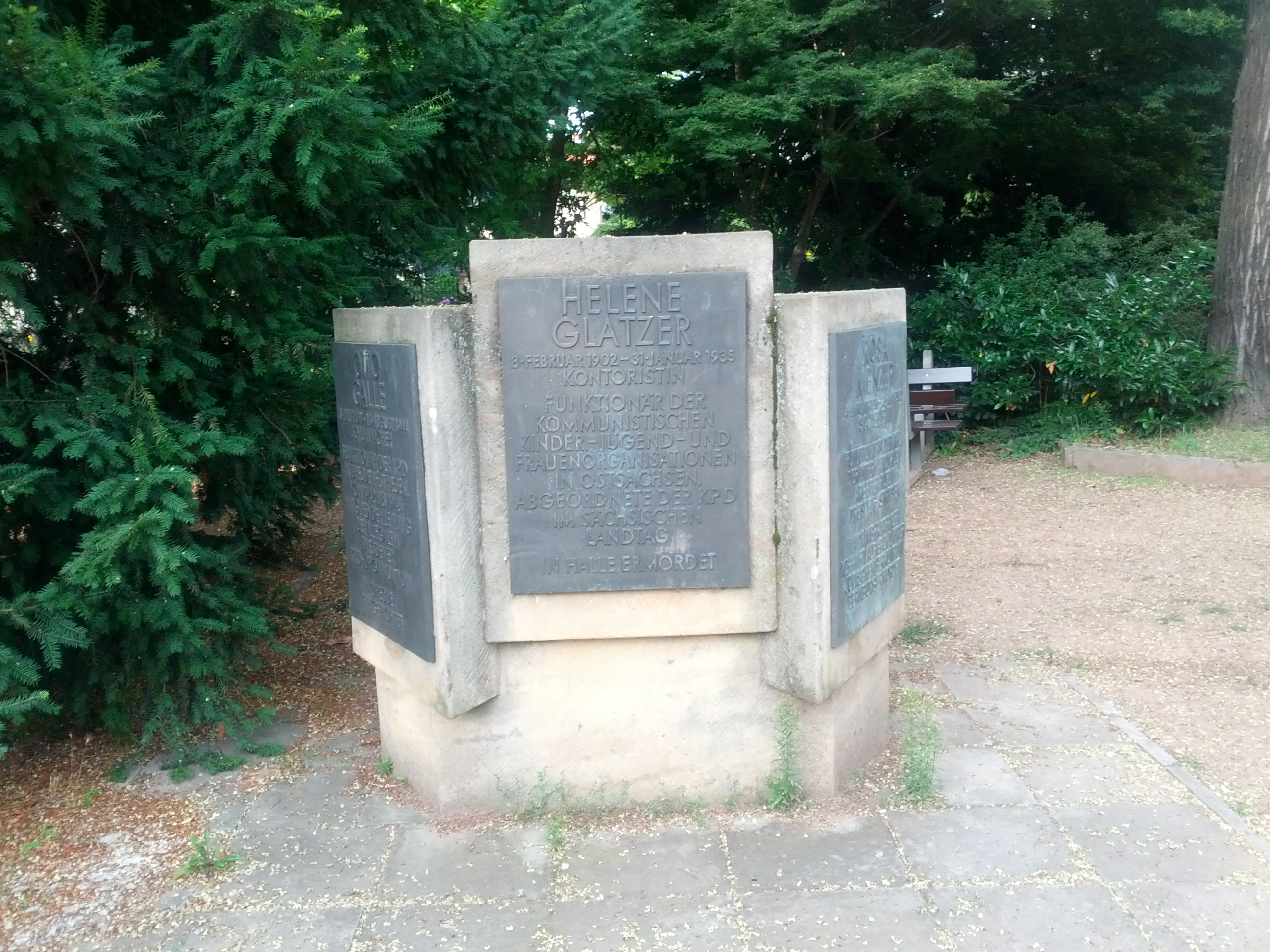 Denkmal am Barbarossaplatz in Dresden; Gedenktafel für Helene Glatzer